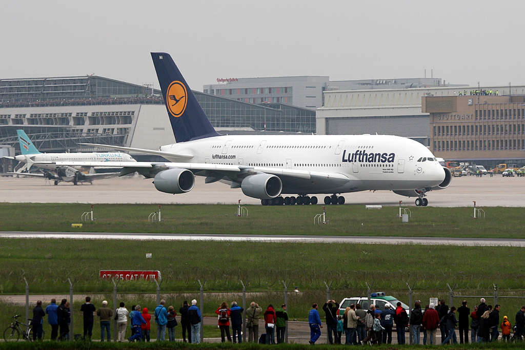 Lufthansa Airbus A380-800 D-AIMA am Flughafen Stuttgart